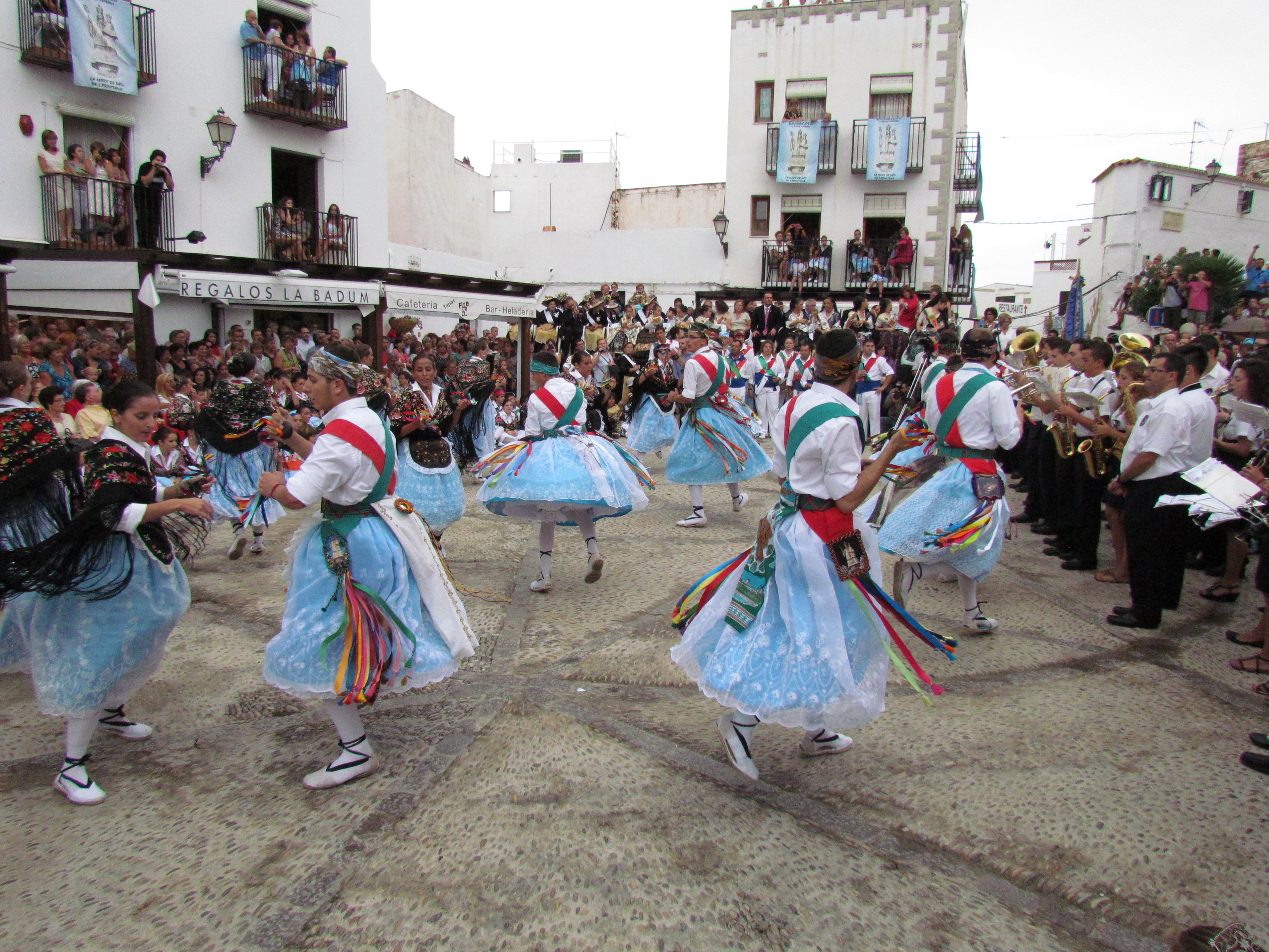 Ball de dansants i llauradores en honor a la Verge de l'Ermitana de Peníscola (Baix Maestrat), en les festes patronals de 2013